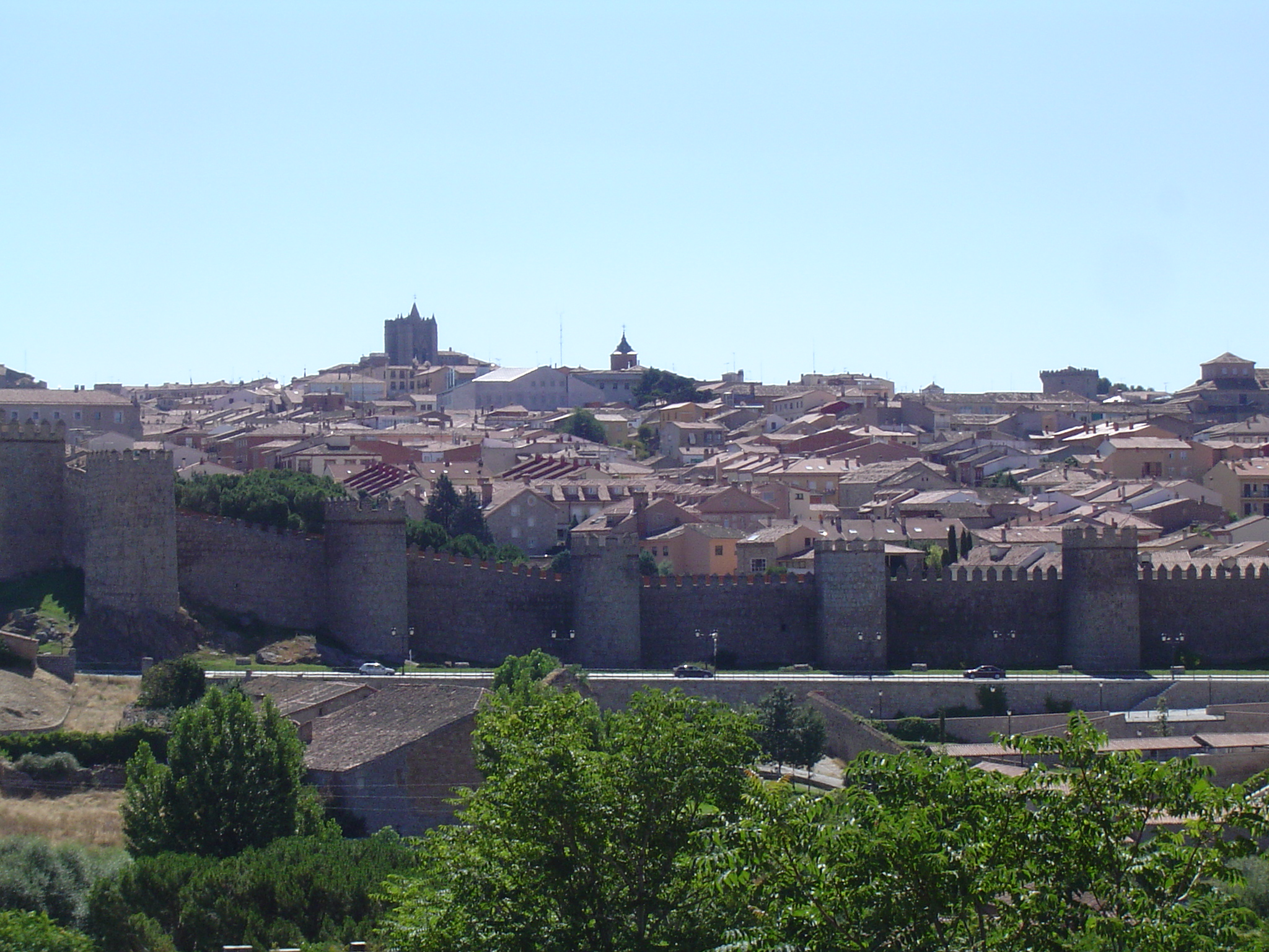 Murallas de Ávila